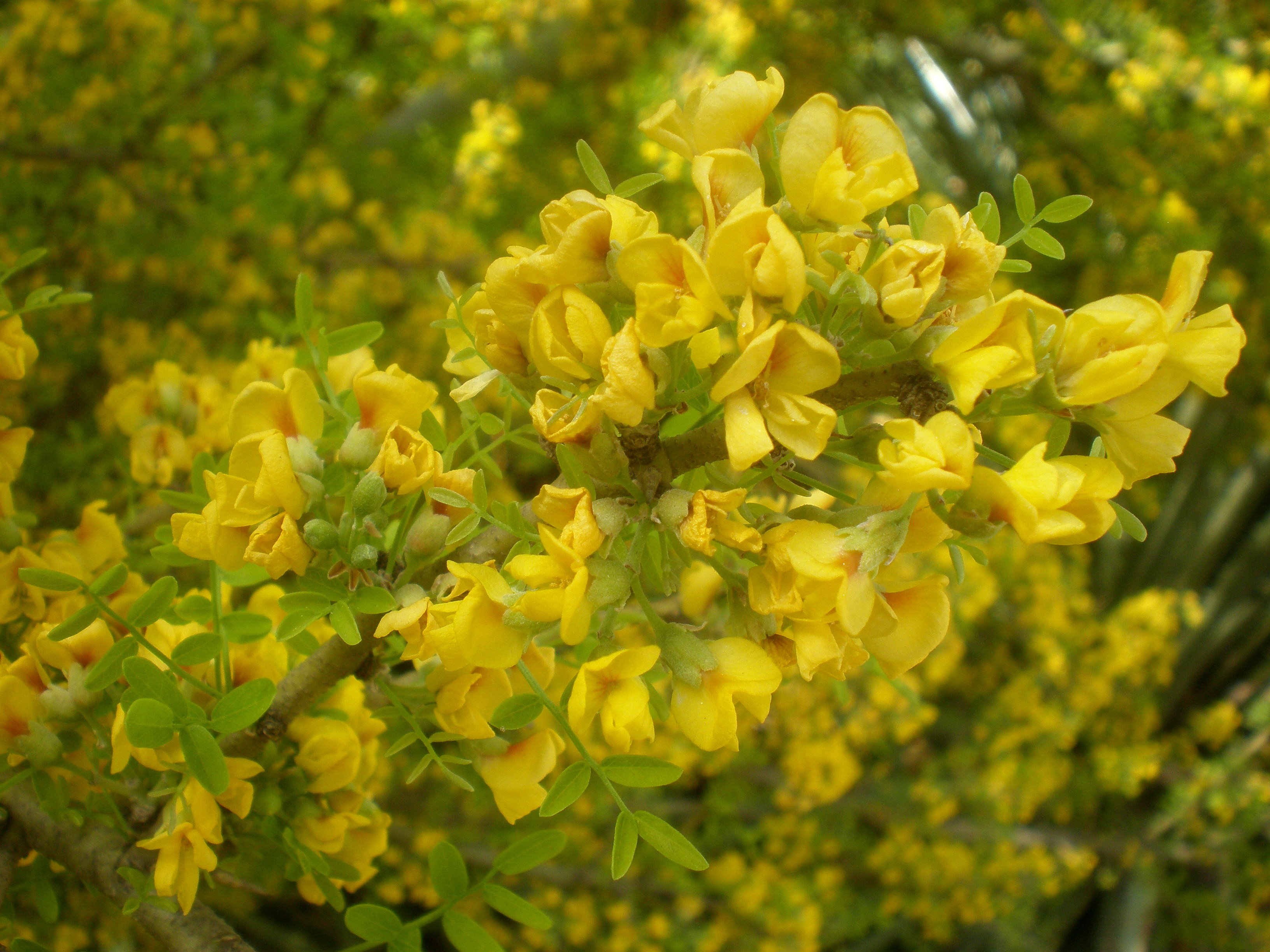 Flores amarillas de Geoffroea decorticans.